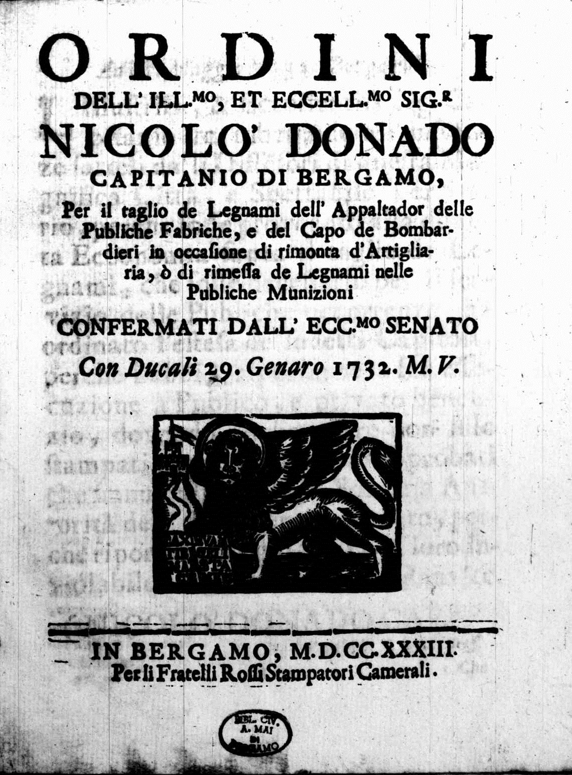 Frontespizio